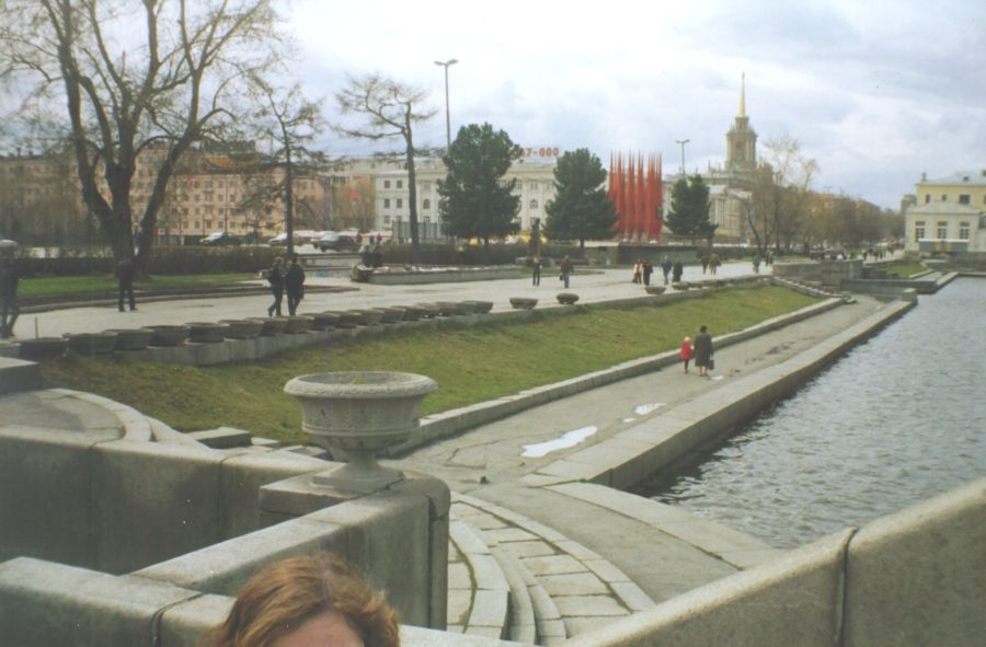 eo Strato apud centro de Jekaterinburg (2005). ru Улица около центра Екатеринбурга (2005). La fonta bildo de cxi tiu bildo estas ankaux en mia propra retpagxaro [1] Mi, auxtoro de la bildo, permesas al cxiuj uzi gxin kun cxi tiuj kondicxoj